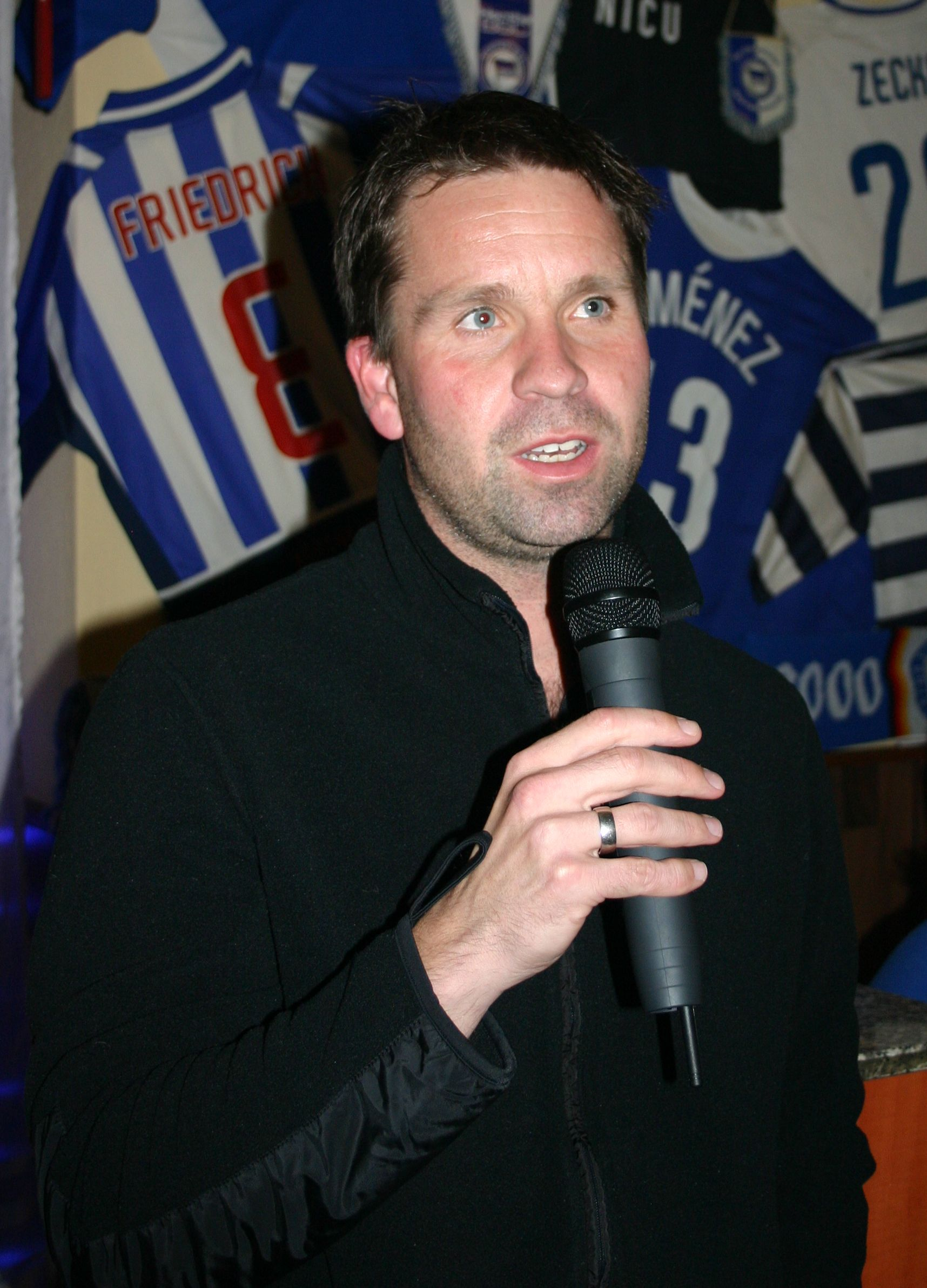 Christian Fiedler